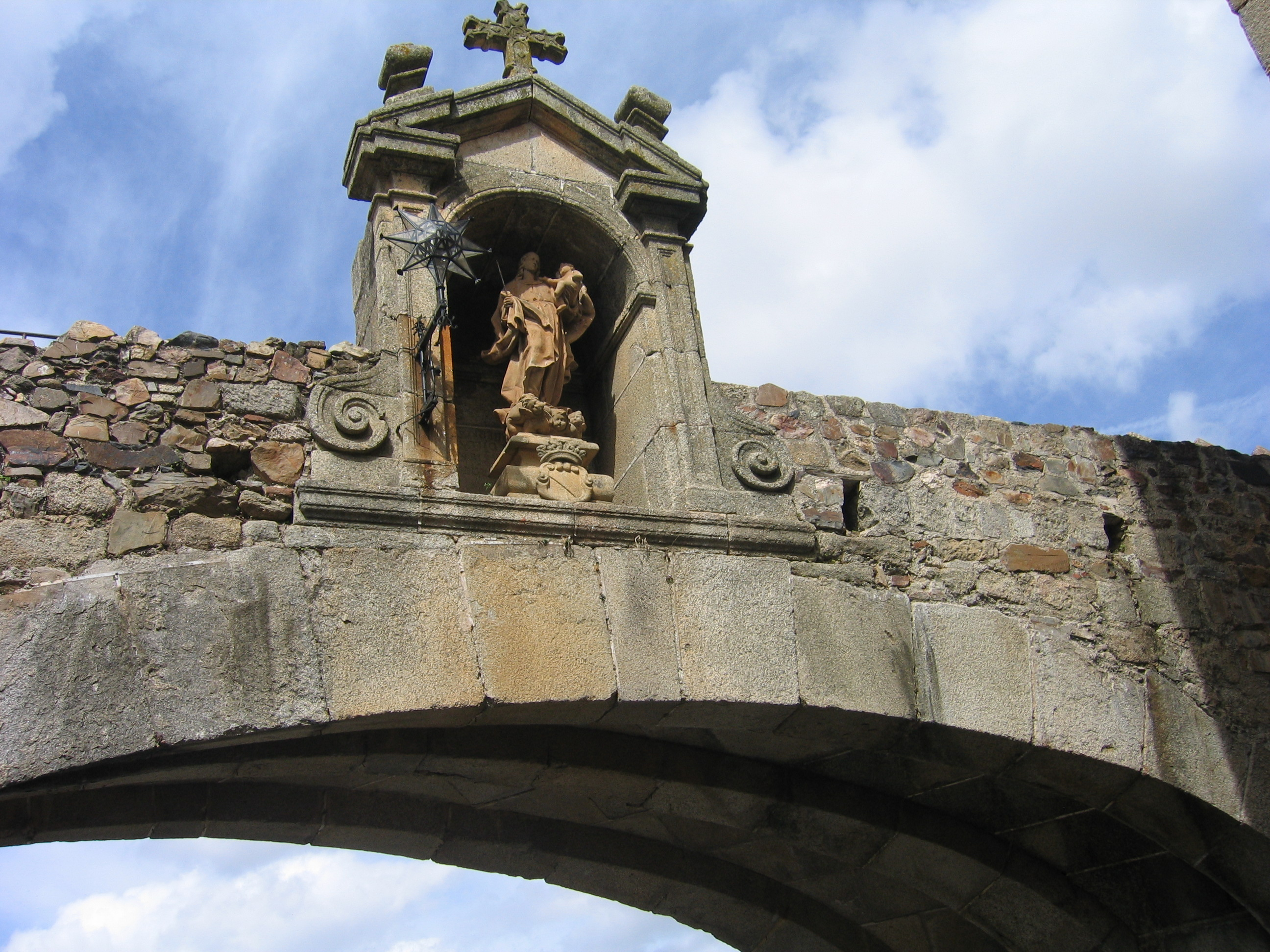 Puerta de la Estrella. Cáceres